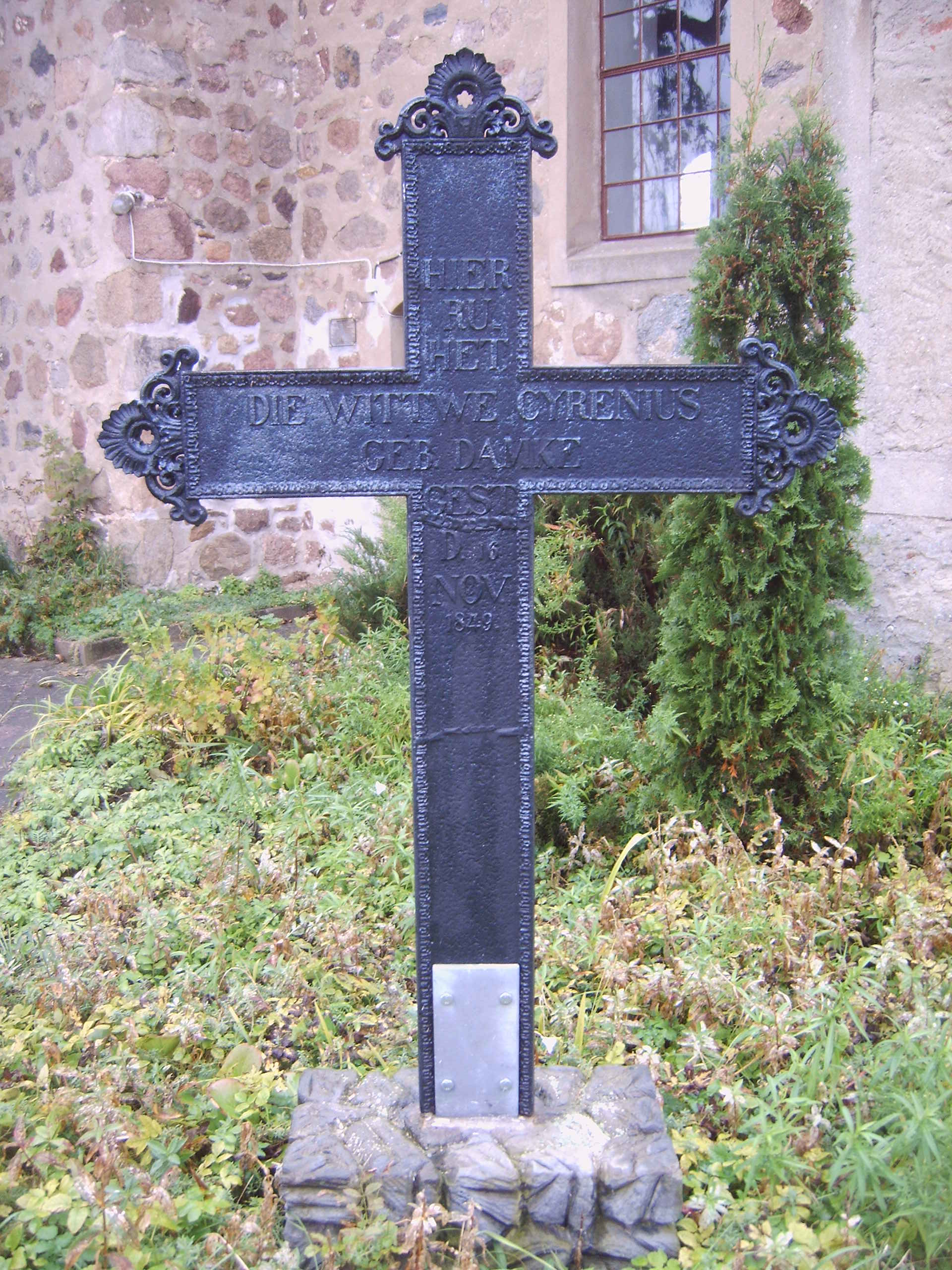 Kreuz auf dem Kirchhof der Dorfkirche Schwiesau, Altmark, Sachsen-Anhalt, Deutschland